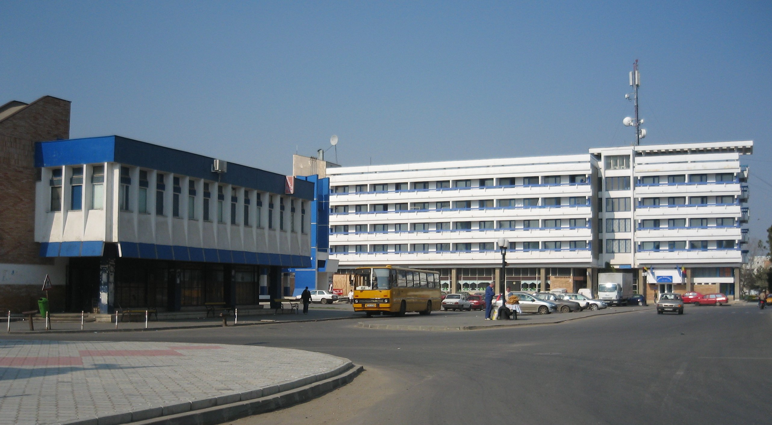 Eu am făcut această fotografie. O eliberez în domeniul public. Sunt de acord ca oricine să folosească această imagine, în orice scop.